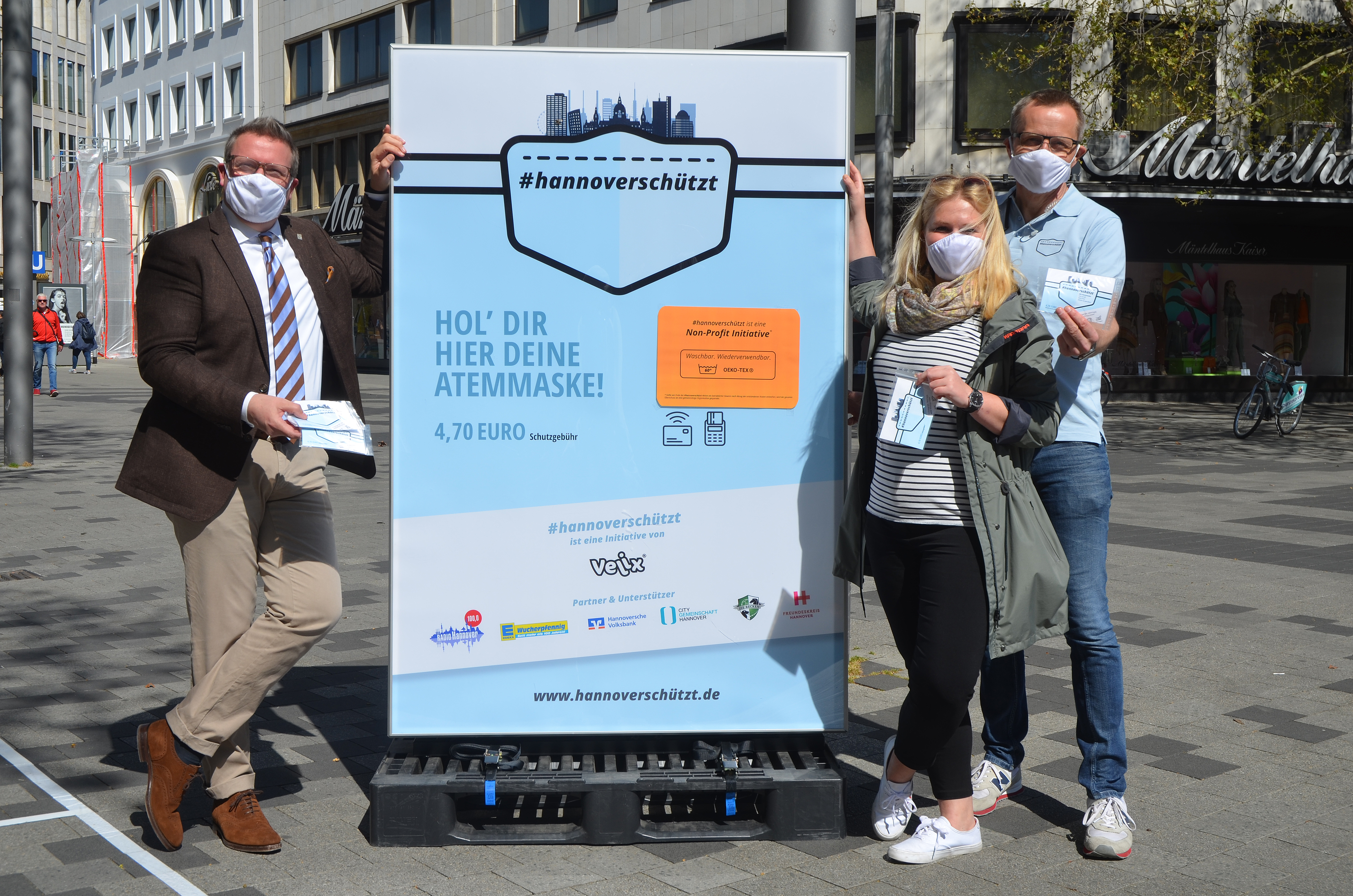 Zum Schutz vor einer Ansteckung mit dem Coronavirus bot die die Firma Velix gegen eine Schutzgebühr von 4,70 Euro wiederverwendbare Atemschutzmasken an. Die Non-Profit-Initiative „#hannoverschützt“ warb am Platz der Weltausstellung in Hannover plakativ mit der Aufforderung „Hol' Dir hier Deine Atemschutzmaske“ Am 20. April 2020 stellten sich hier (von links) der Geschäftsführer der City-Gemeinschaft Hannover e.V. Martin Prenzler, die Geschäftsführerin vom Freundeskreis Hannover Katharina Sterzer sowie der Geschäftsführer der Firma Velix Lutz Niereisel den Fotografen ...